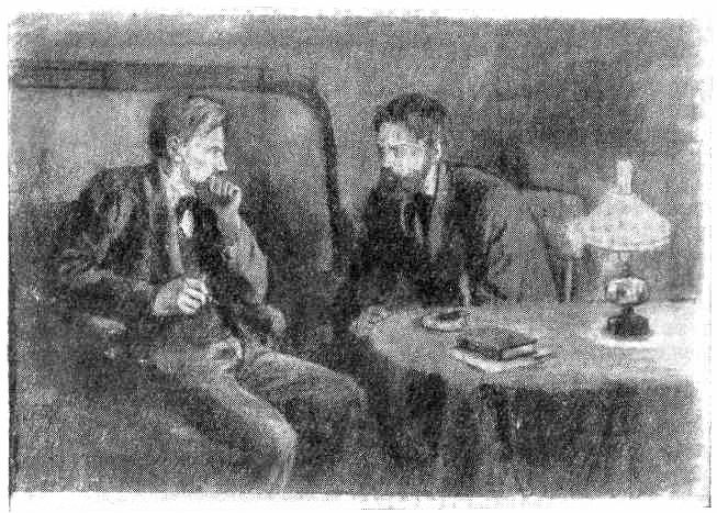 Lopuchov e Kirsanov, personaggi del romanzo "Che fare?" di Nikolaj Černyševskij in un'illustrazione di Vladimir Domogackij (1878-1939)